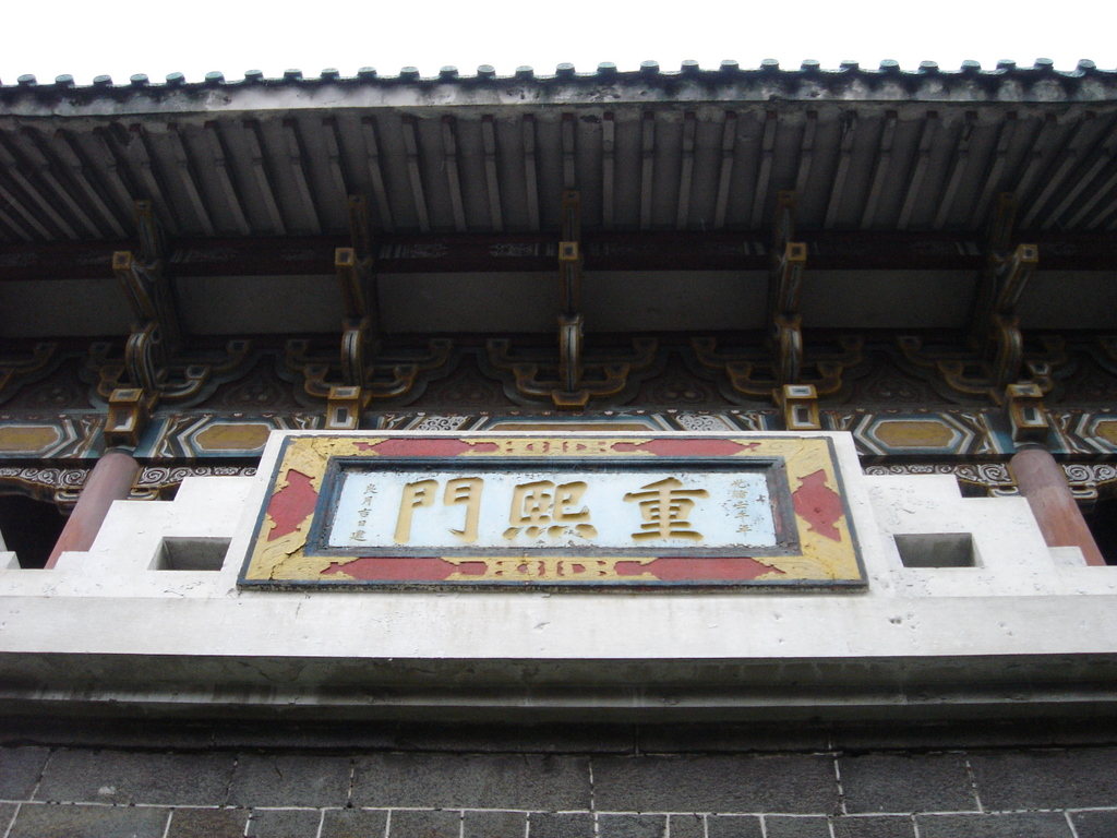 中文（台灣）: 臺北府城小南門匾額。